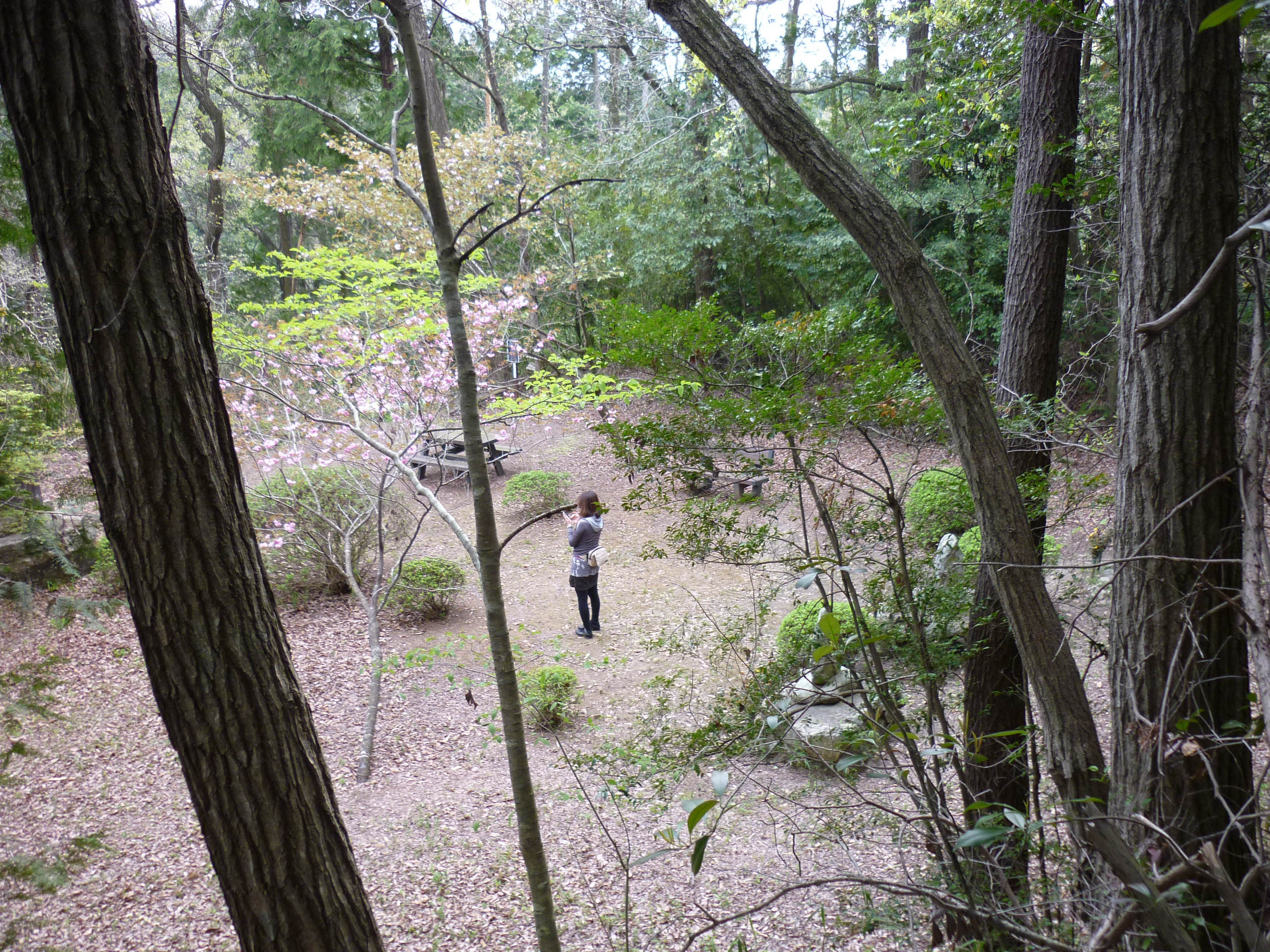 主郭